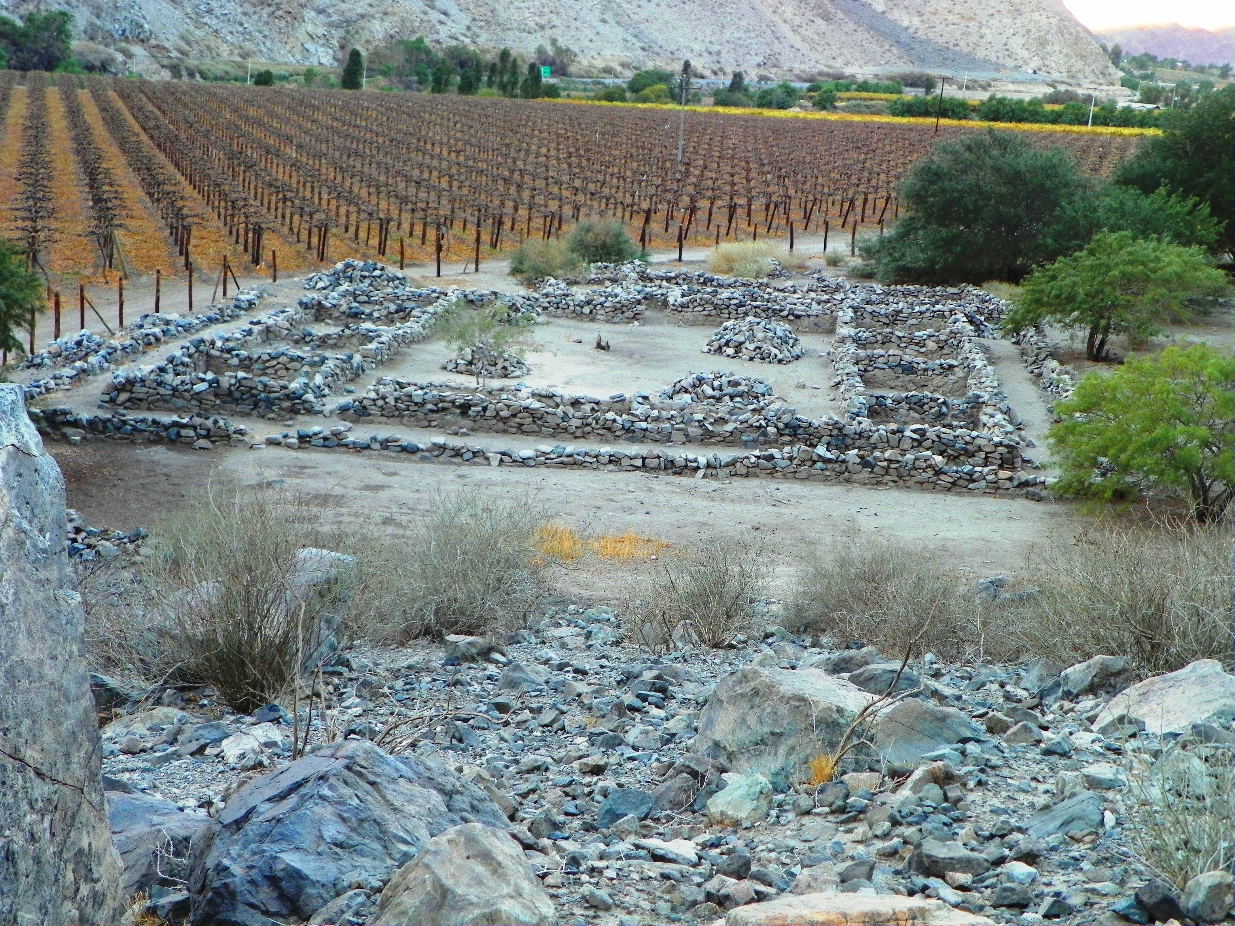 Vista desde una de las esquinas del recinto desde un cerro aledaño